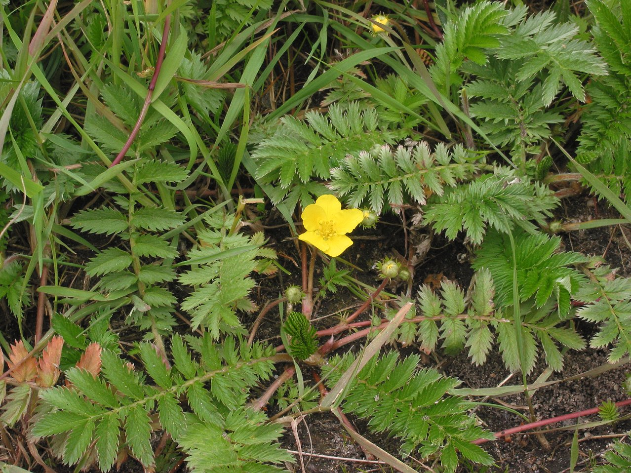 (Zilverschoon plant) Potentilla anserina